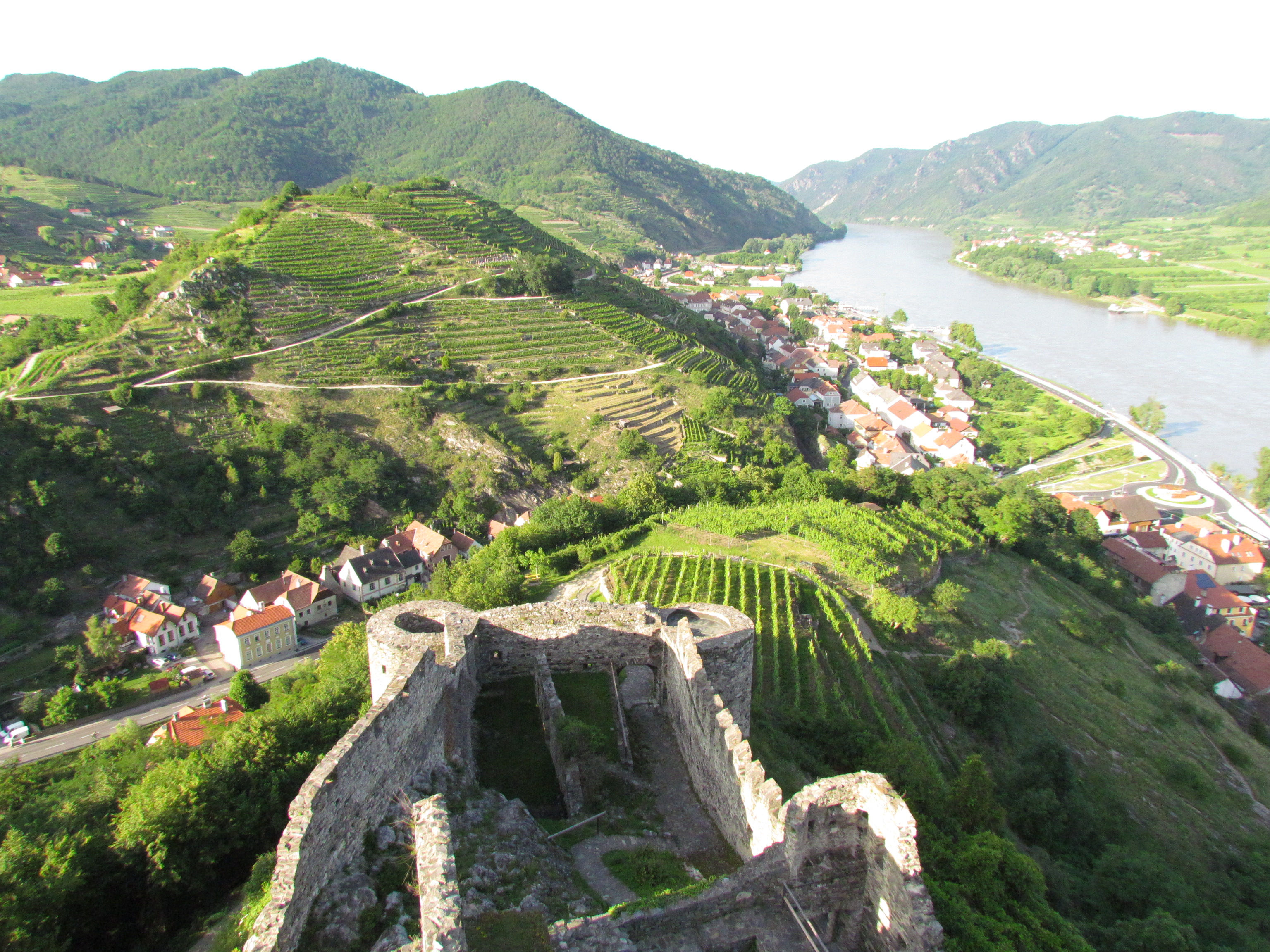 Im Herzen der Wachau liegt Spitz an der Donau mit der Ruine Hinterhaus. Auf der linken Seite ist auch der Tausendeinmerberg zu sehen.